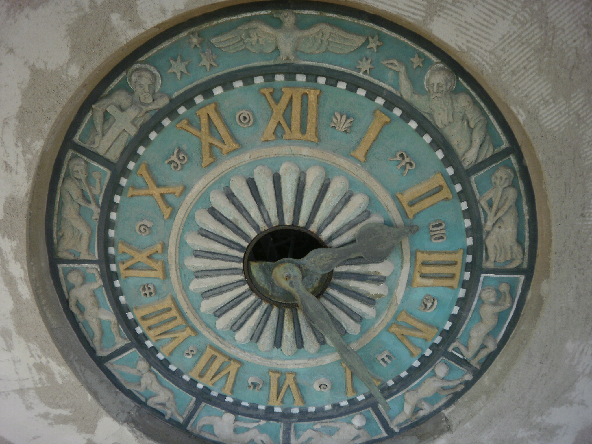 2015 restauriertes Ziffenblatt auf der Ostseite der Dankeskirche in Halbe.